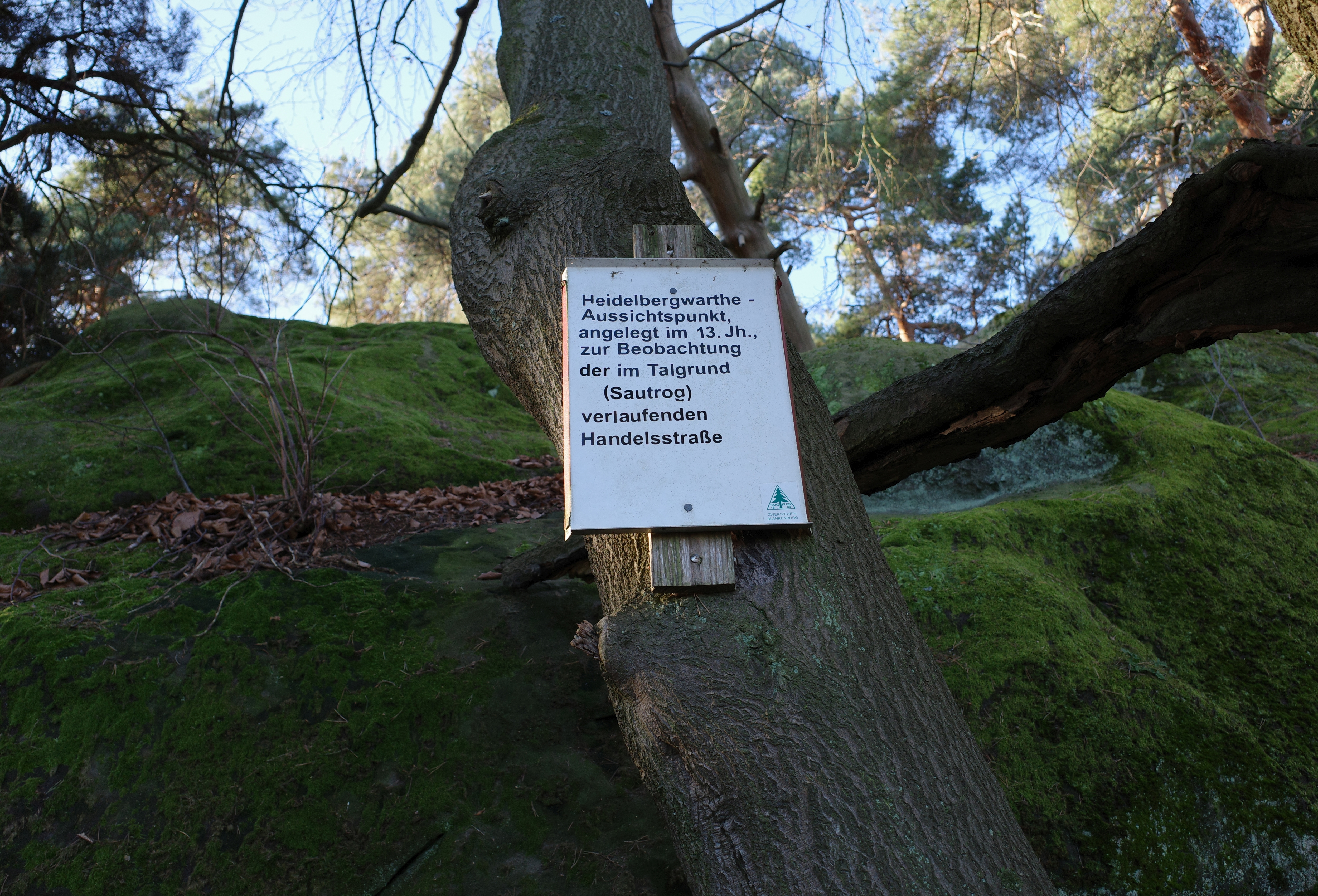 Blankenburg (Harz), Heidelbergwarte. Informationstafel vom Harzclub 1886, Zweigverein Blankenburg.